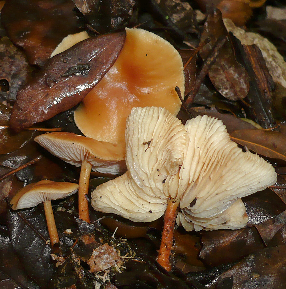 Gymnopus lanipes (Malençon & Bertault) Vila & Llimona